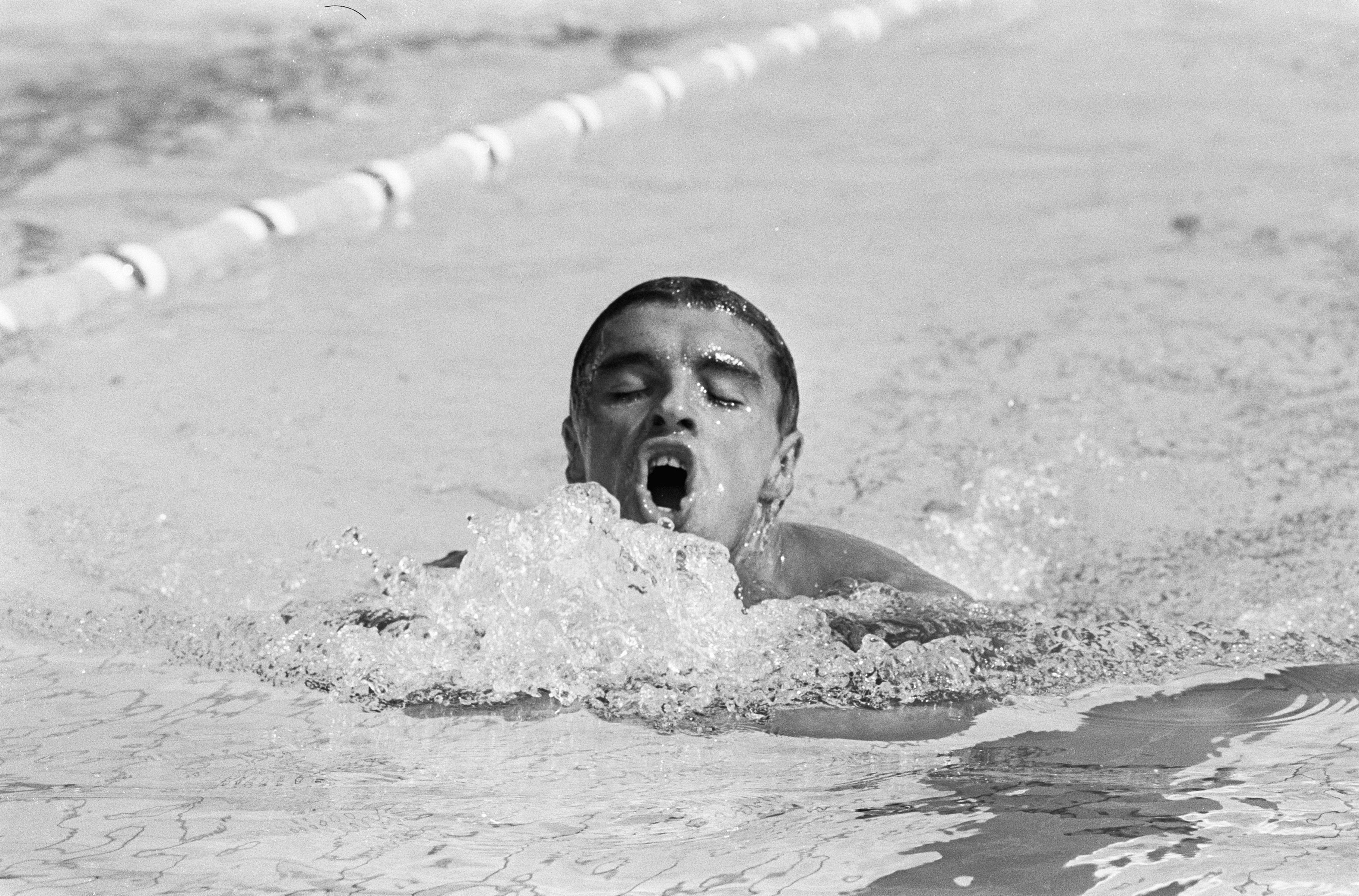 Collectie / Archief : Fotocollectie Anefo Reportage / Serie : [ onbekend ] Beschrijving : Europese Zwemkampioenschappen, Oleg Fotin 4 x 100 meter wisselslag (Rusland) Datum : 23 augustus 1966 Locatie : Utrecht Trefwoorden : sport, zwemmen Fotograaf : Kroon, Ron / Anefo Auteursrechthebbende : Nationaal Archief Materiaalsoort : Negatief (zwart/wit) Nummer archiefinventaris : bekijk toegang 2.24.01.05 Bestanddeelnummer : 919-4791